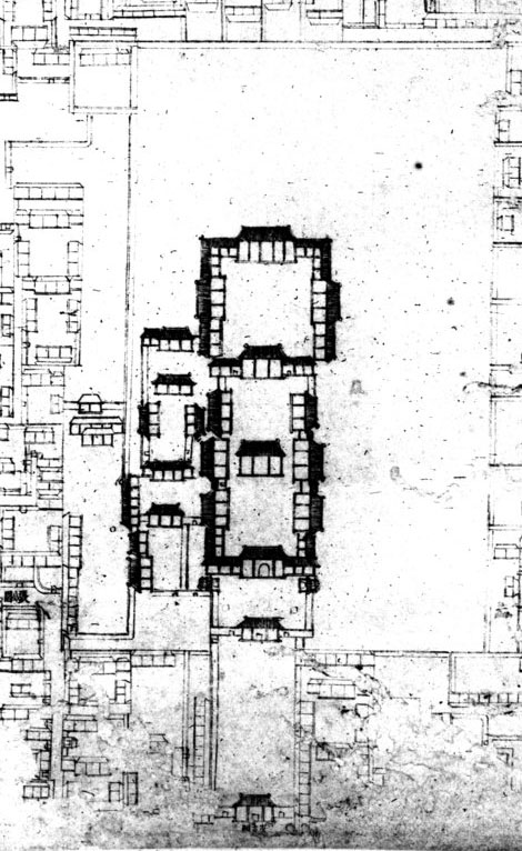 乾隆十五年（1750年）完成的《乾隆京城全图》中的崇元观（崇玄观）。本图来自清內務府藏京城全圖，故宮博物院影印，民國二十九年十二月（1940年）。